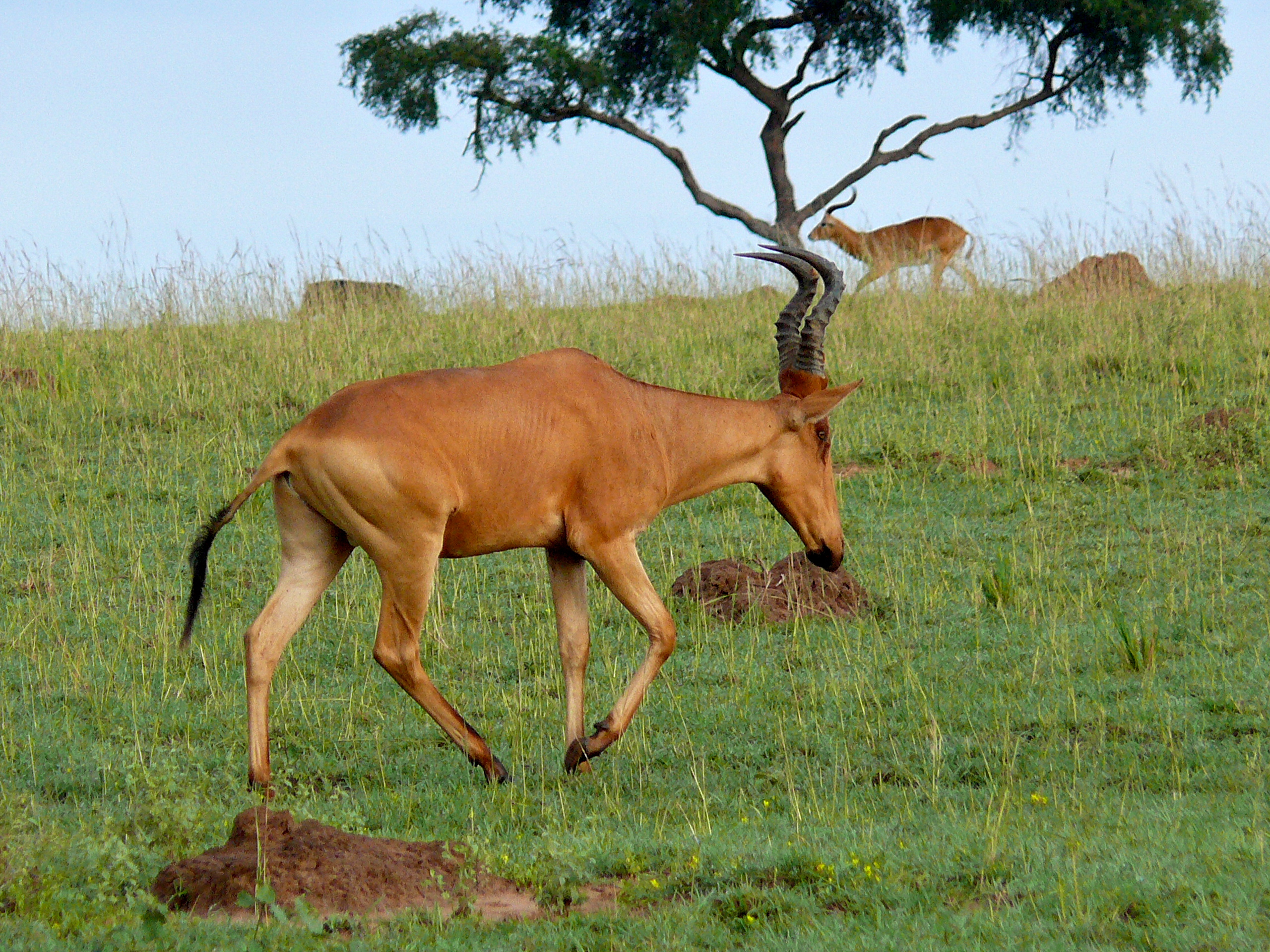 Murchison Falls NP, UGANDA